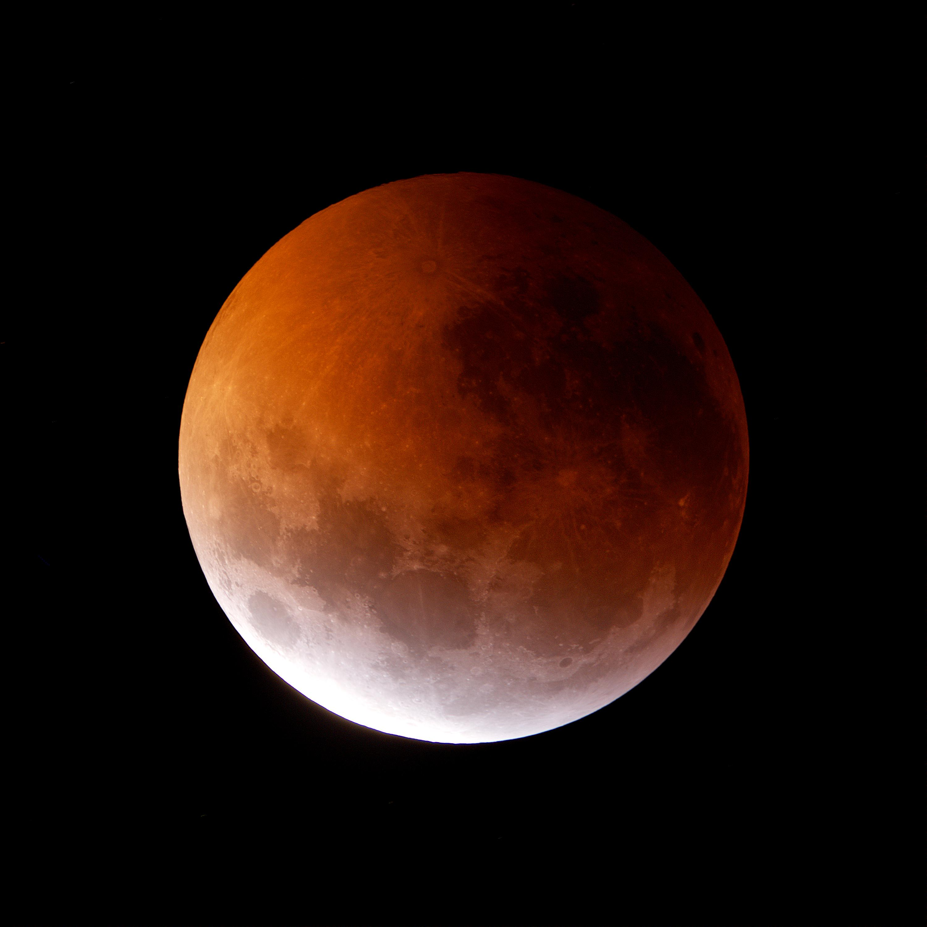 Eclipse lunar 2019. Santiago de Chile. Autor: Luis Rojas.